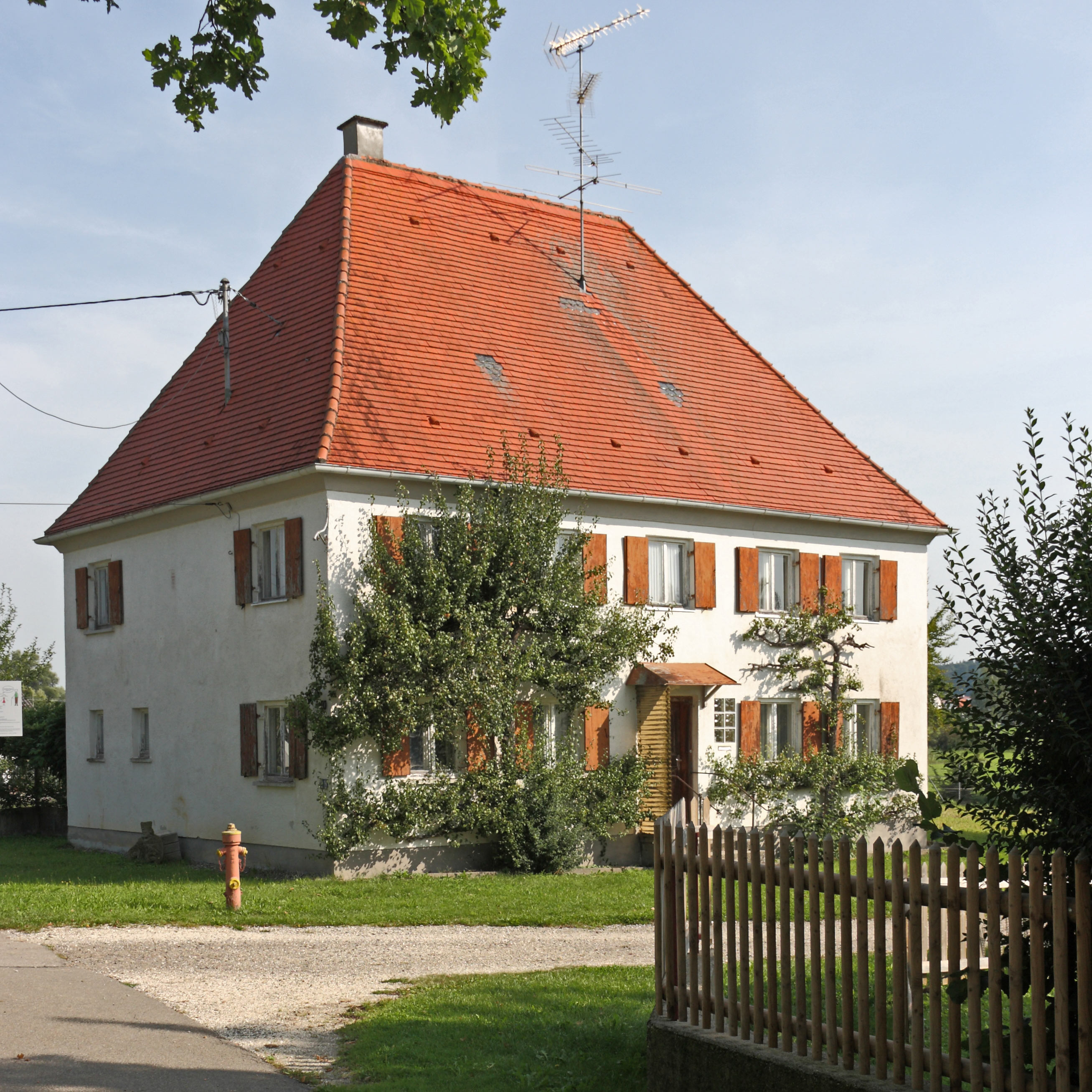 Pfarrhaus von Behlingen, Stefanstr. 10, Gemeinde Kammeltal; von Joseph Dossenberger d.J. 1783 erbaut